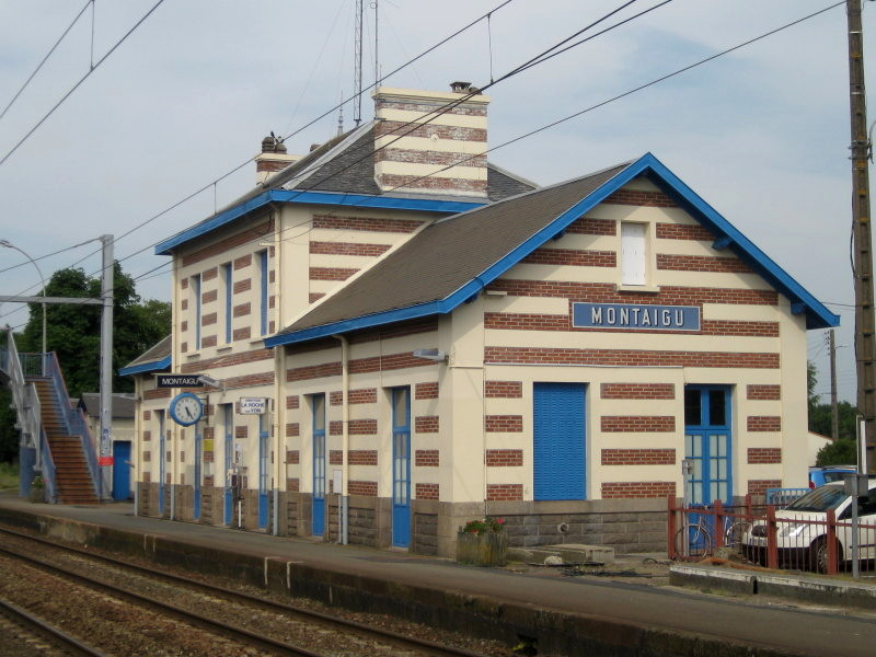 Bâtiment voyageurs de la gare de Montaigu en Vendée